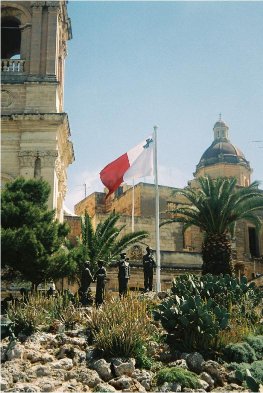 Freedom Monument in Birgu Malta